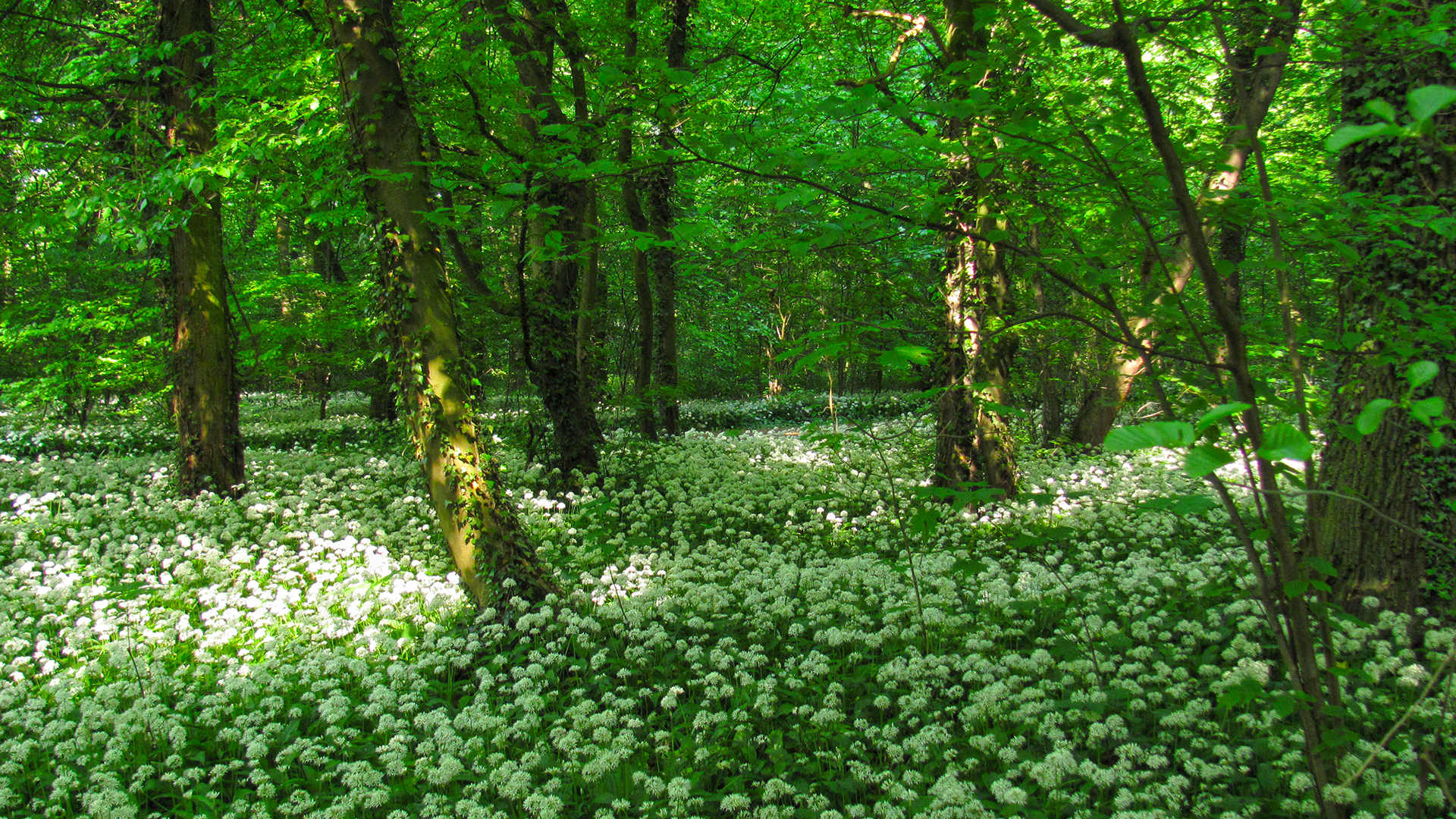 Bärlauchblüte im Niedwald (Frankfurt-Griesheim)